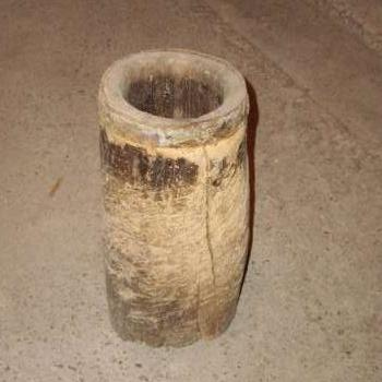 Чутура - старинен български дървен съд за биене на сол, масло и други.